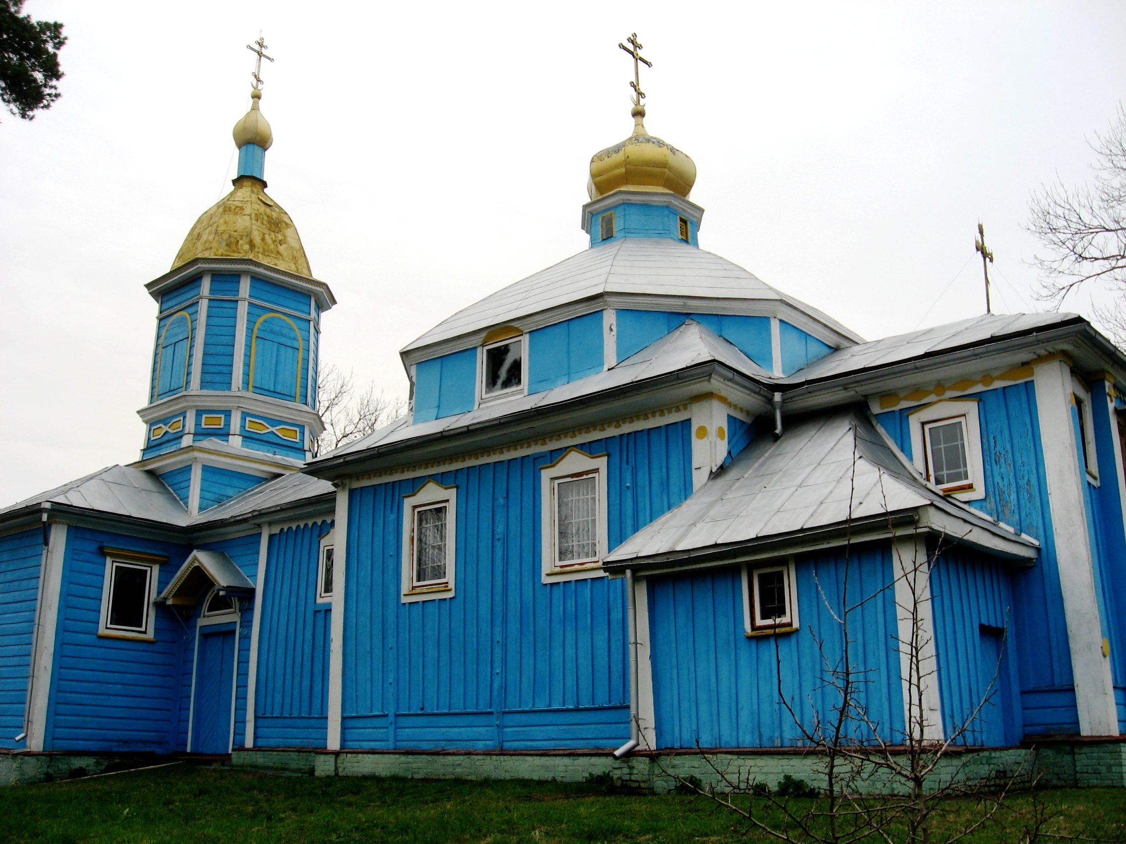 Шепель, Луцький район, Успенська церква, 1780